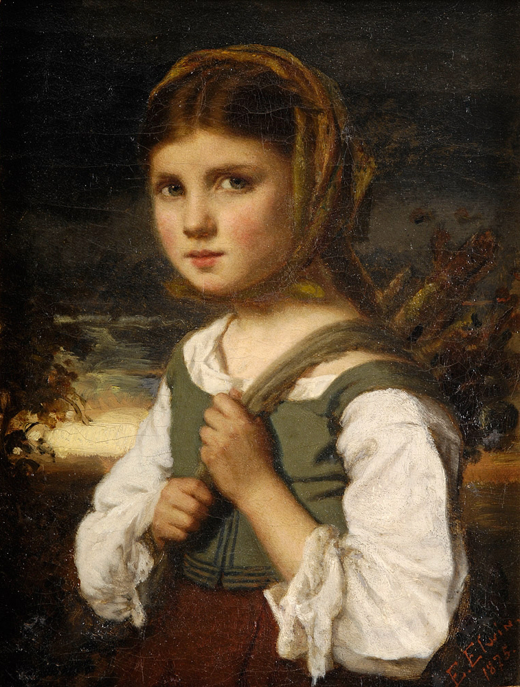 Auf dem Heimweg. Signiert. Öl auf Leinwand, 32,5 x 25 cm